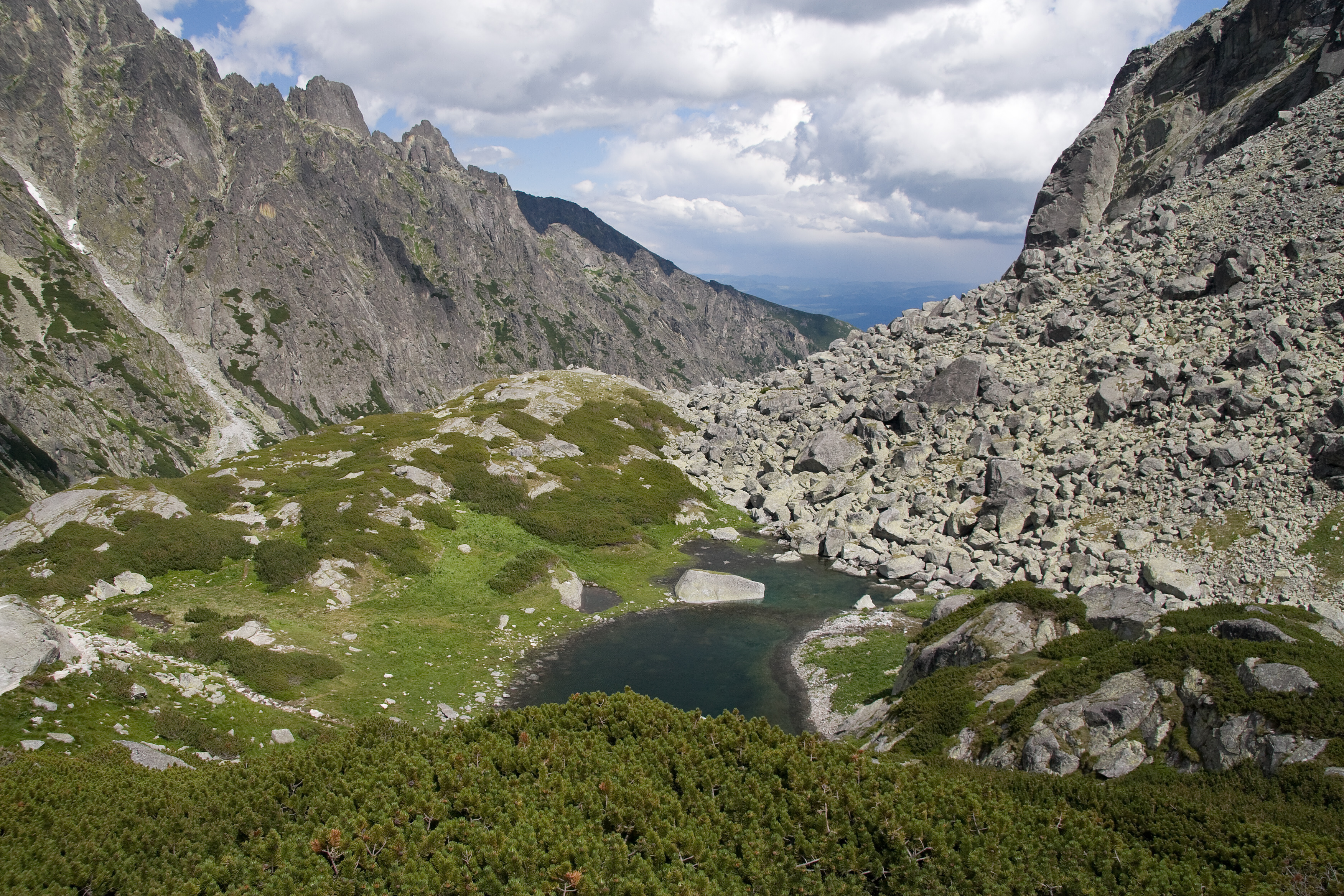 Vareškové pleso